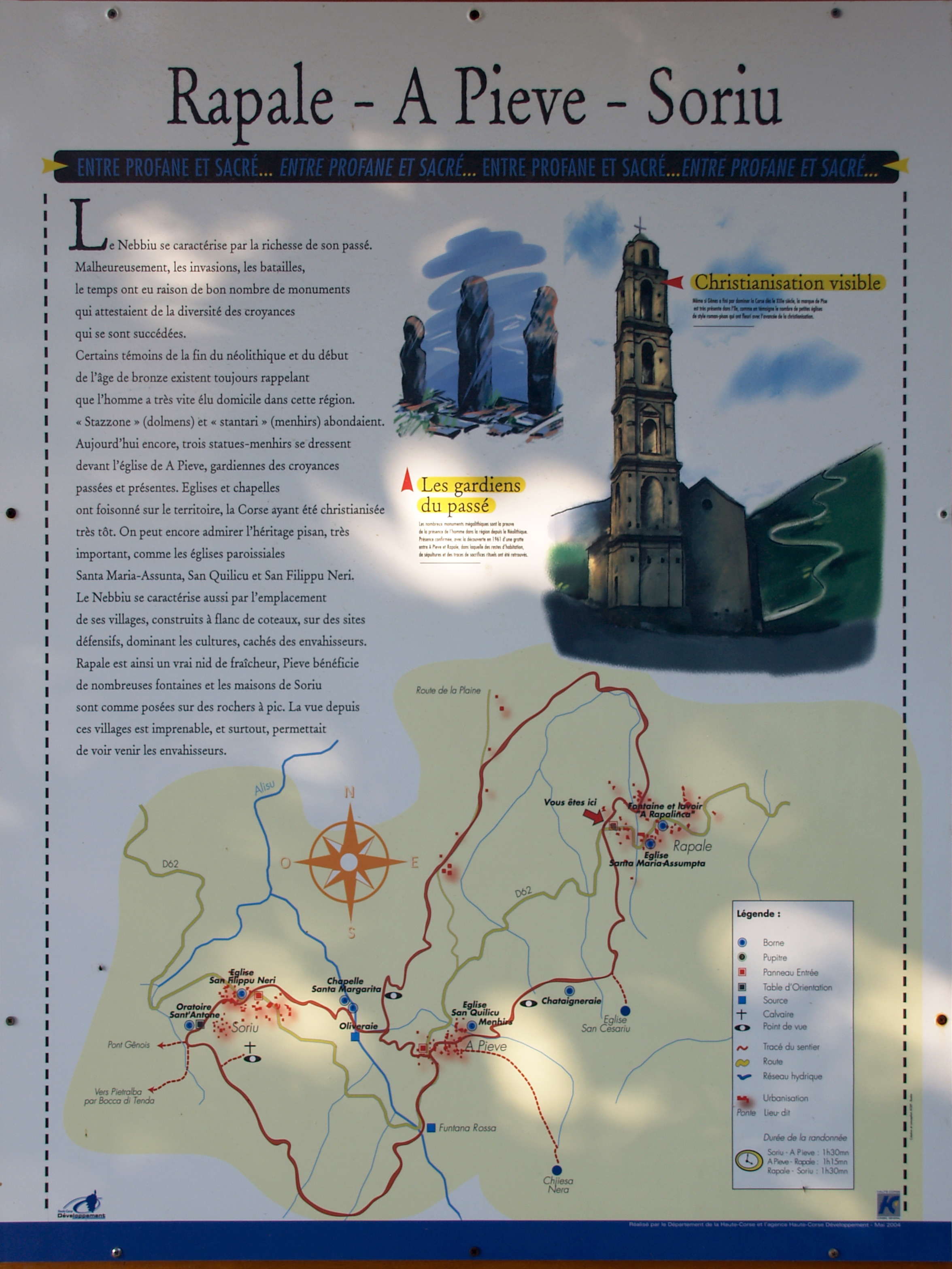 Corsica - Panneau Rapale - A Pieve - Soriu